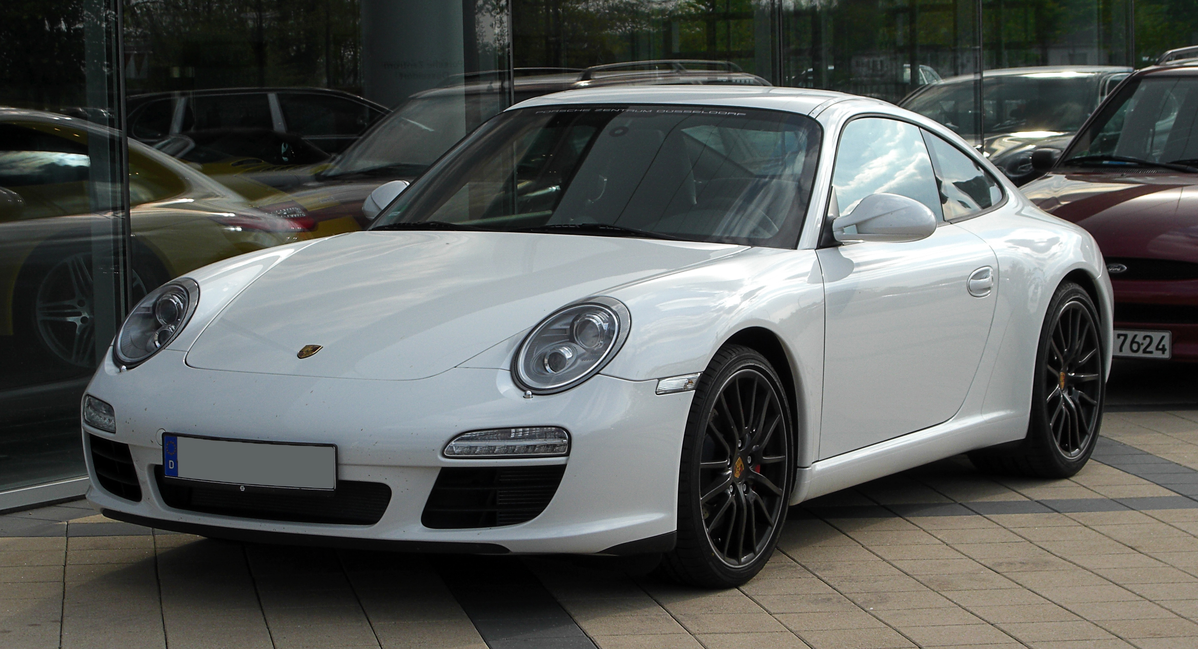 Porsche 911 Carrera S Coupé (997, Facelift)